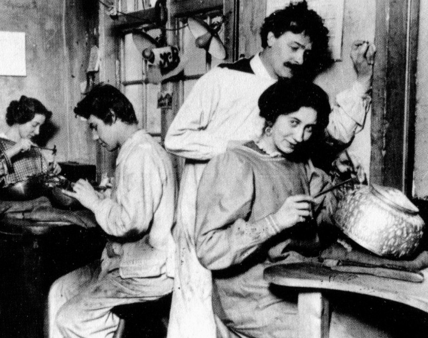 Georg Jensen i sin verkstad på Bredgade i Köpenhamn